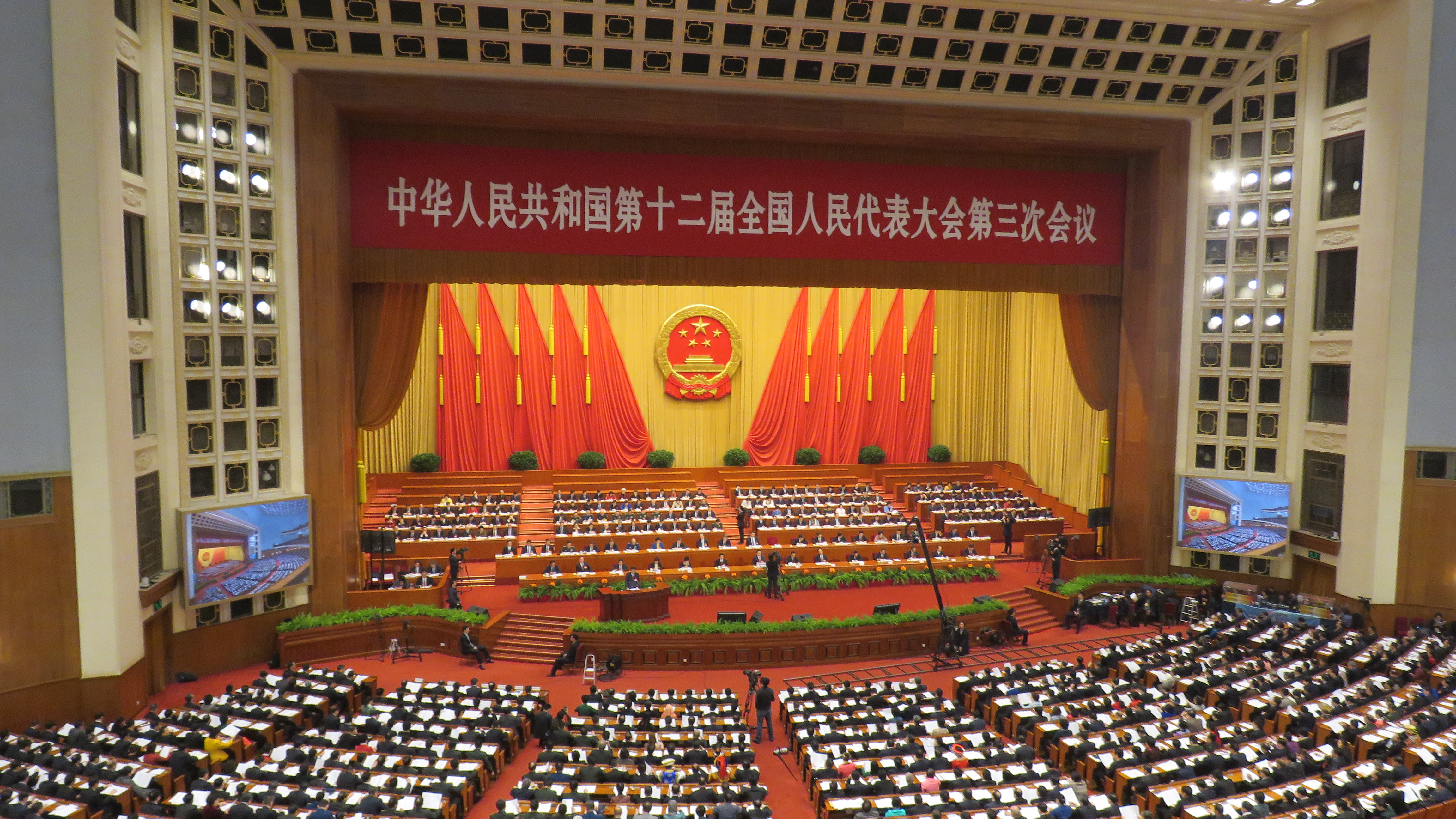 中华人民共和国第十二届全国人民代表大会第三次会议在2015年3月5日在北京人民大会堂的开幕现场。